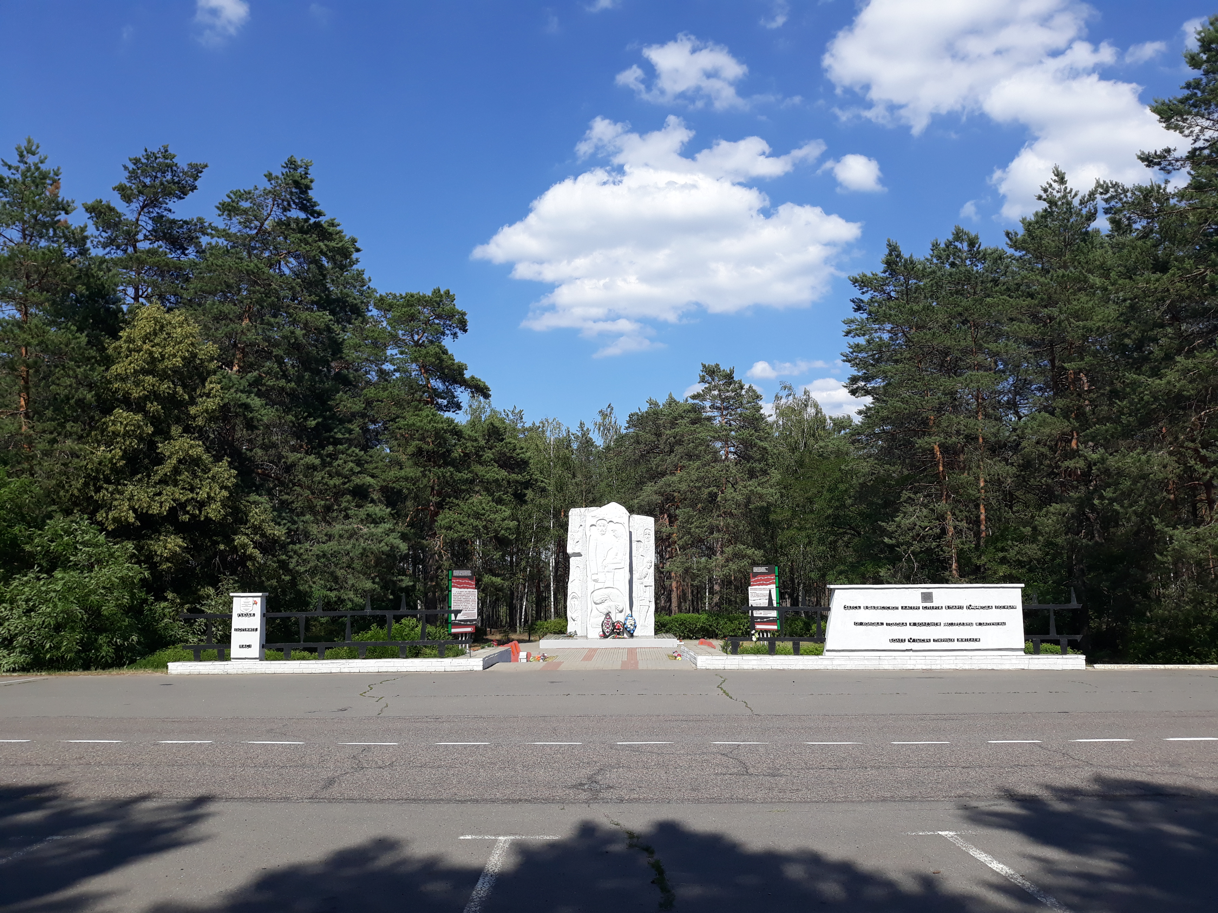 Мемарыял Азарычы